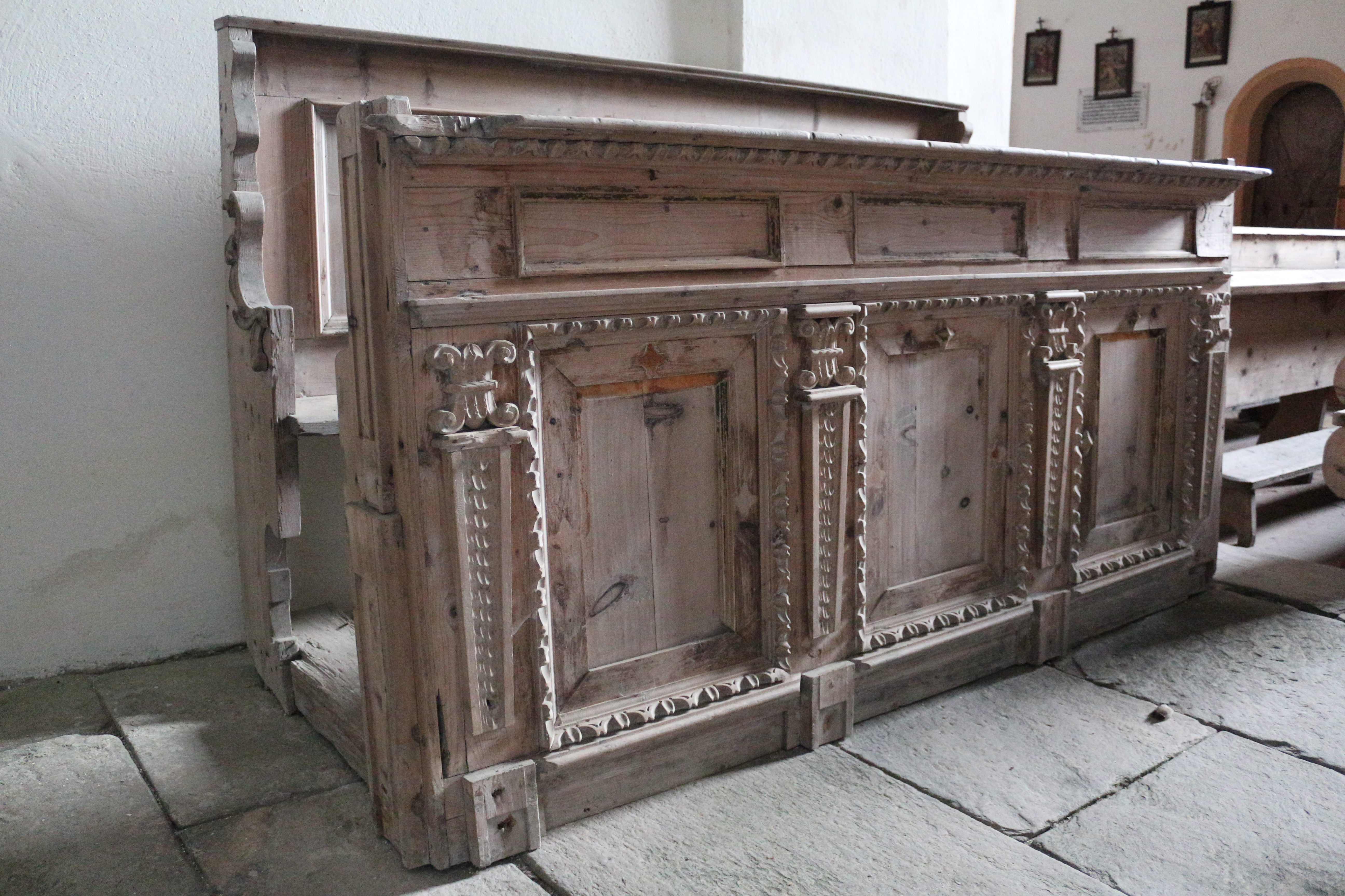 Kirchenbank der Filialkirche hl. Virgil in Gaishorn am See